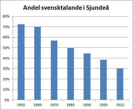 Andel svensktalande i Sjundeå 1950-2012. Källa